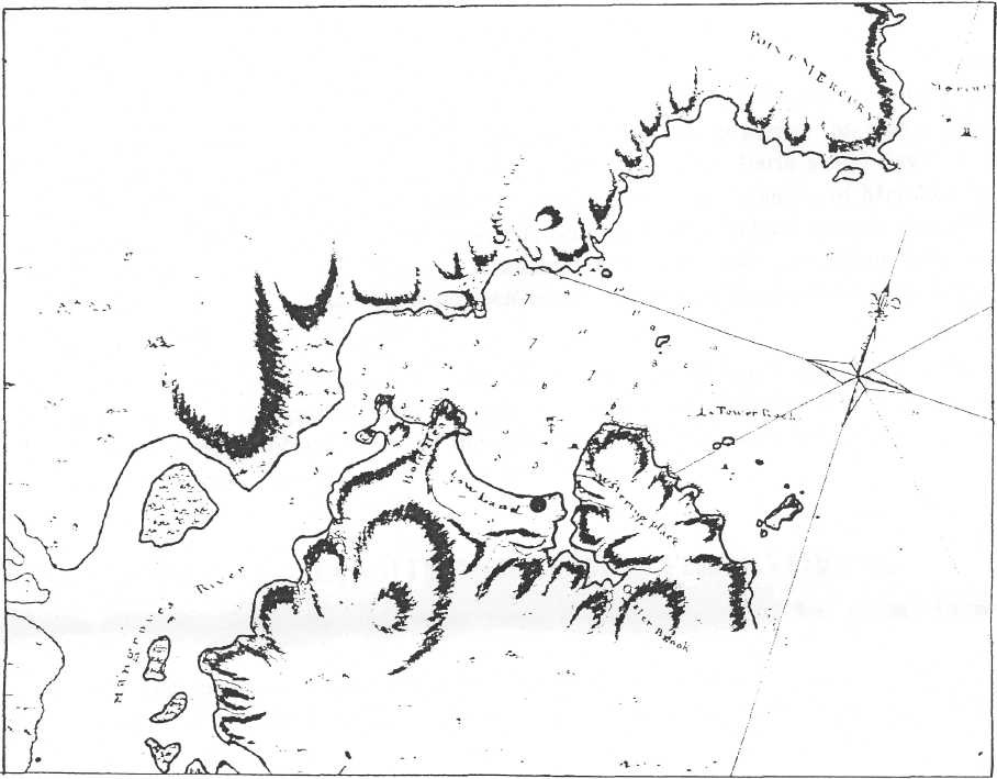 Parte de la carta náutica de Mercury Bay realizada por el ayudante del master Richard Pickersgill, del HMB Endeavour, noviembre de 1769. El punto marca el lugar en el que se realizó la observación del tránsito de Mercurio el 9 de noviembre de 1769.